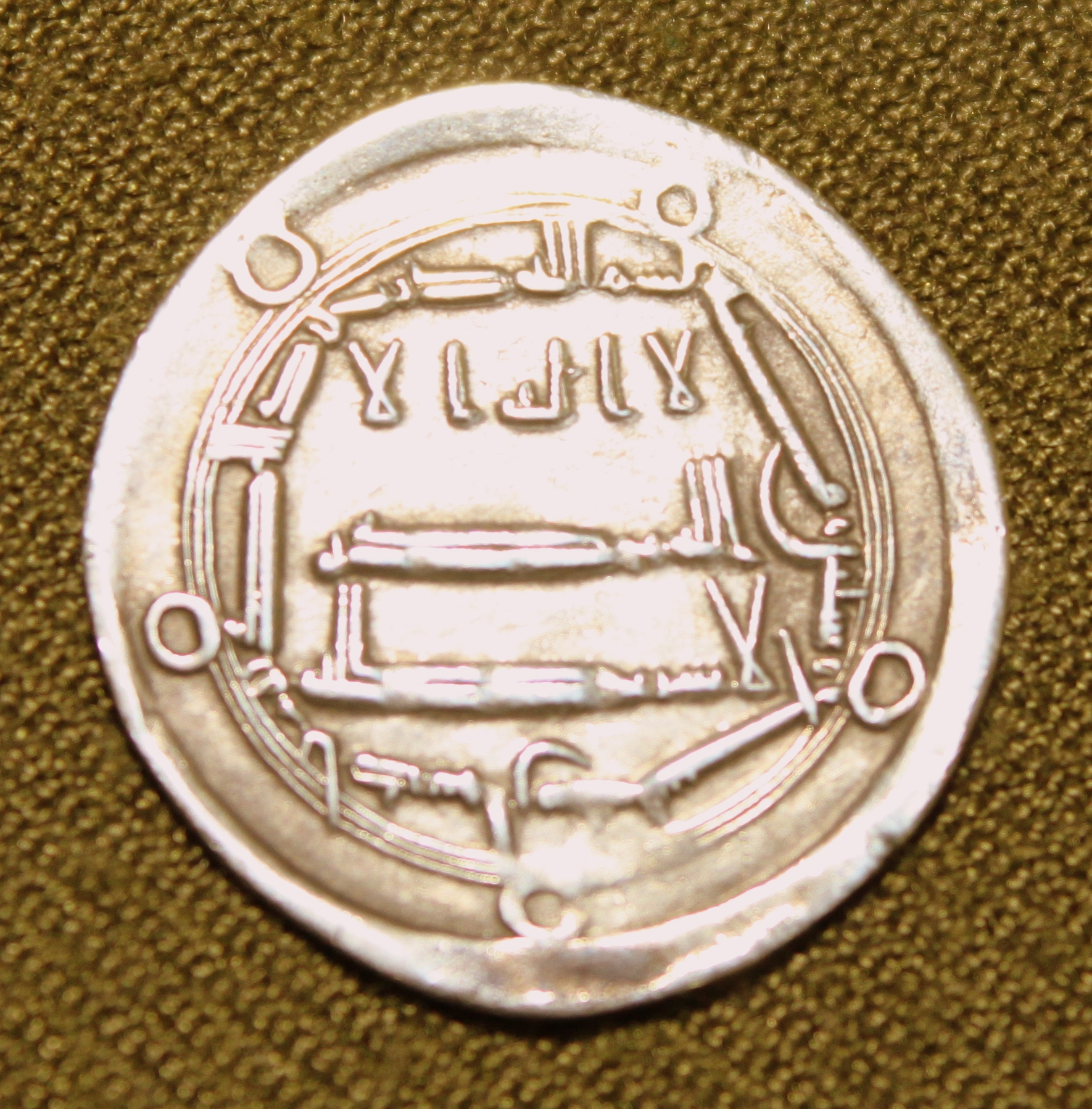 Аббасиды серебряный дирхам 785 год.